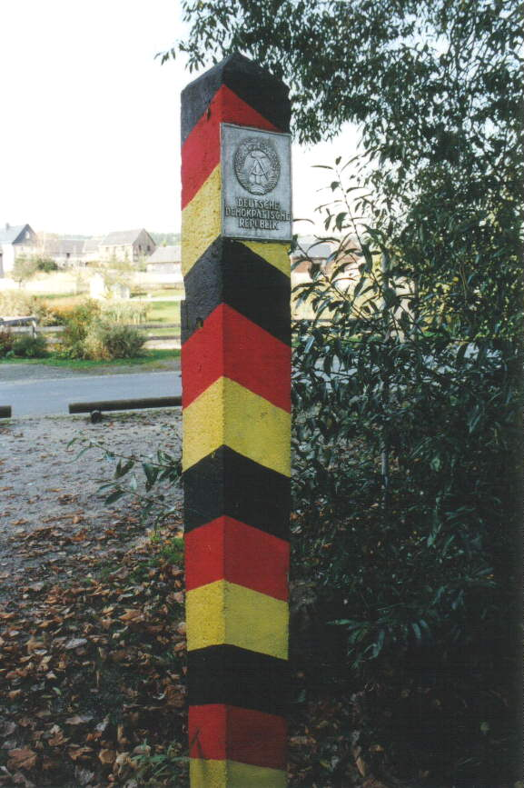 Diese Grenzsäule in Mödlareuth markierte den Beginn des DDR-Gebiets (Herbst 2001).